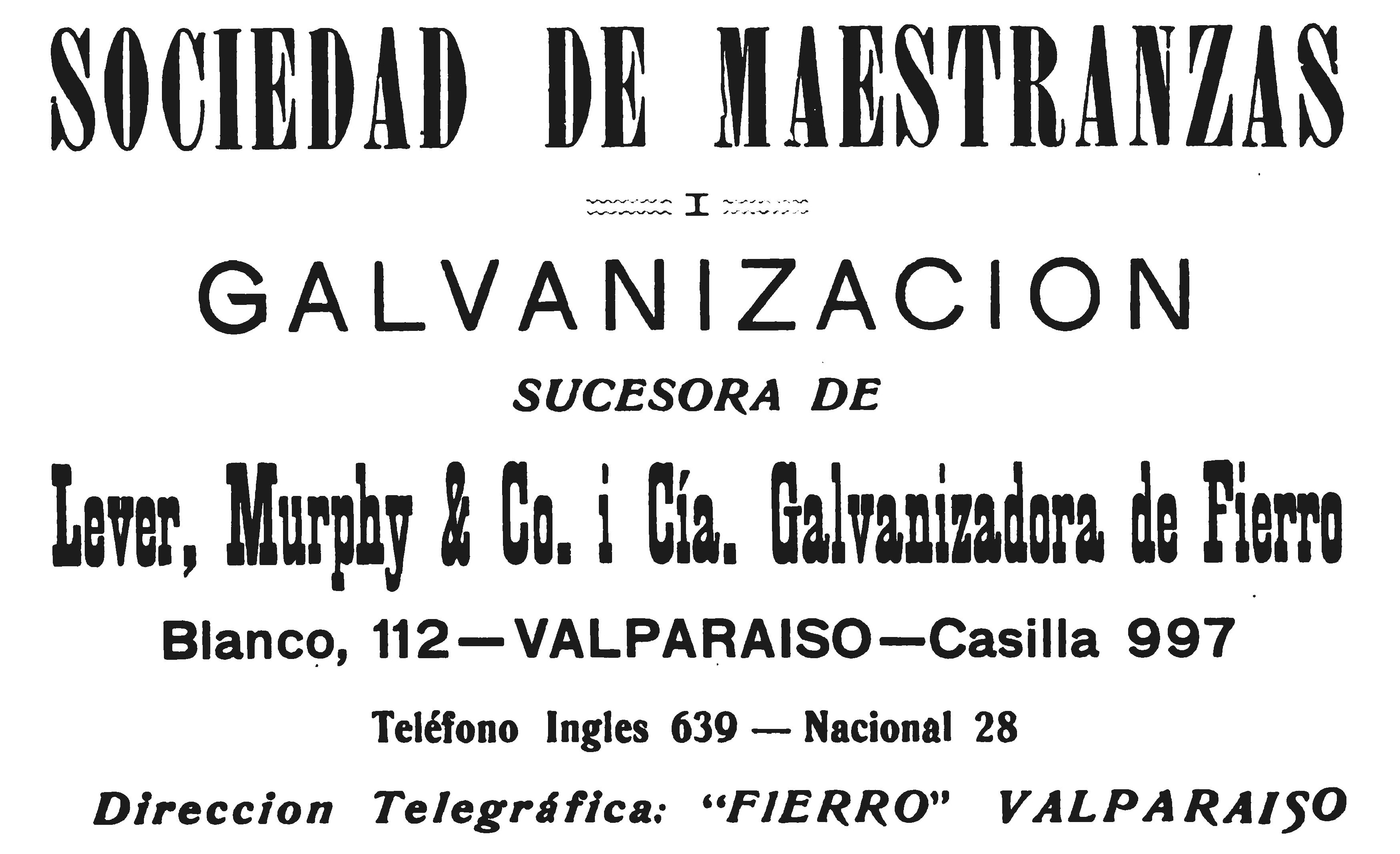 Publicidad de la Sociedad de Maestranza y Galvanización, ca. 1913.